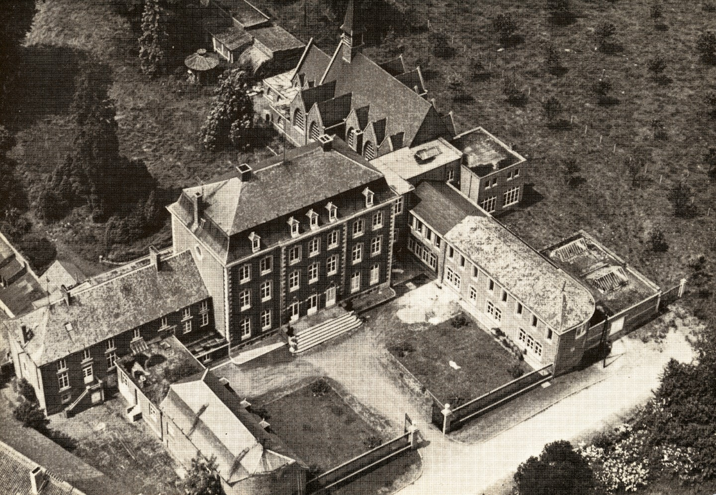 Park van het kasteel van Schoor